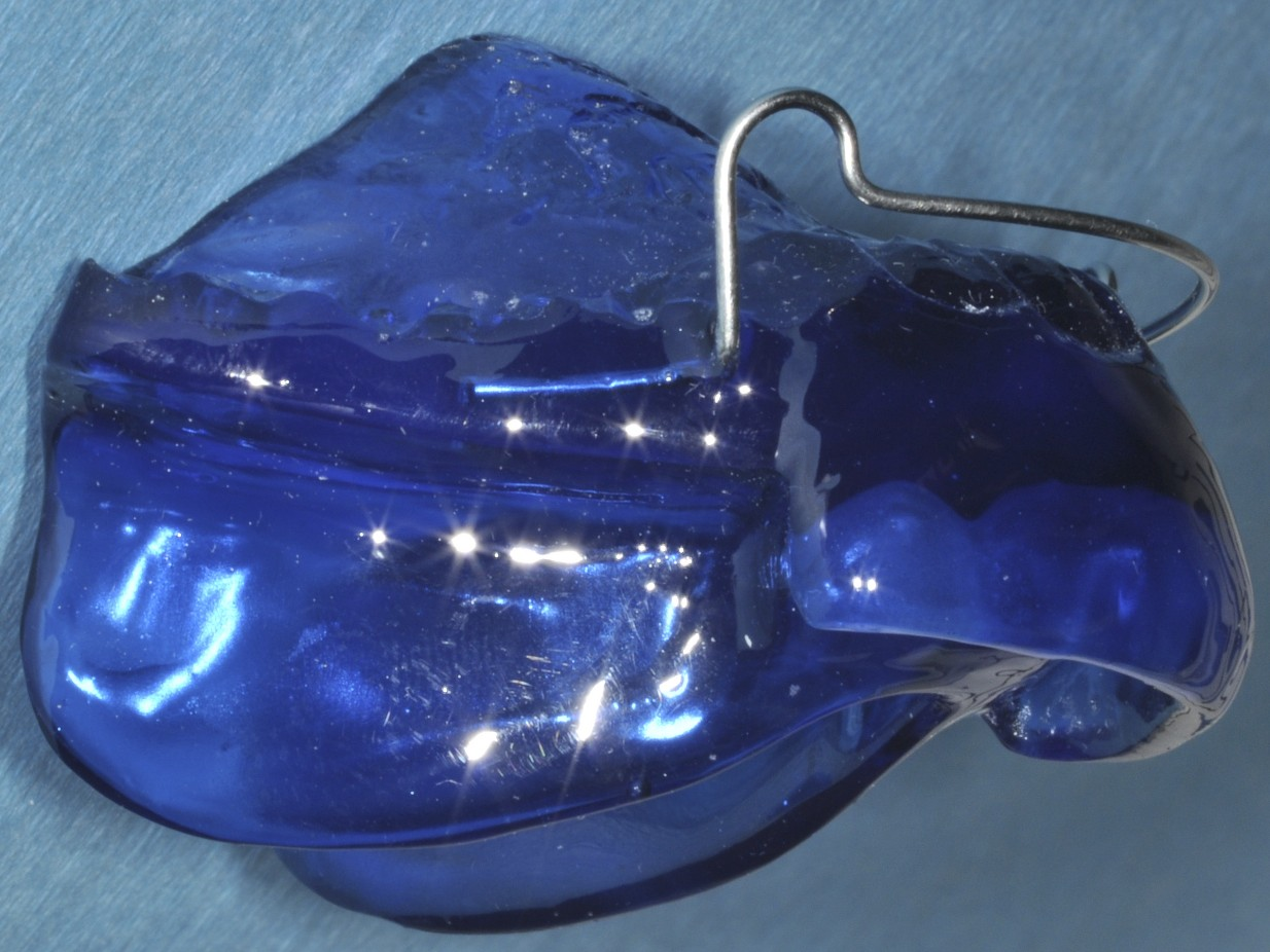 Monobloc avec bandeau vestibulaire vu de côté